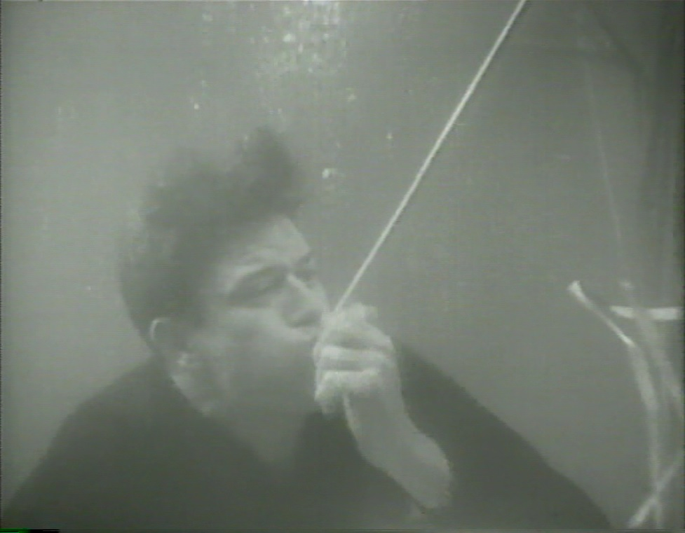 El actor estadounidense John Wayne en una escena de la película El camino de Sagebrush.